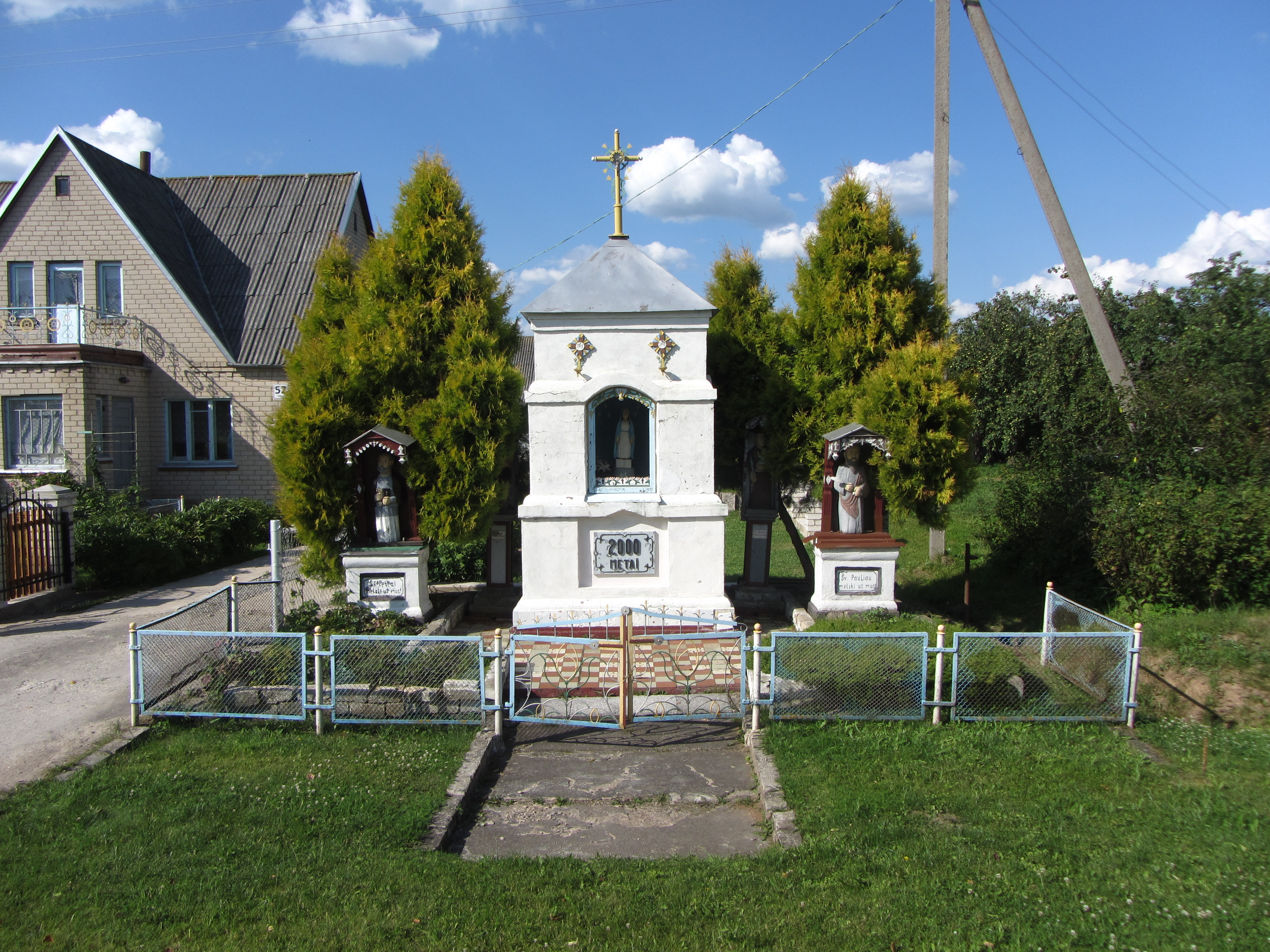 Didžiasalis, Lithuania